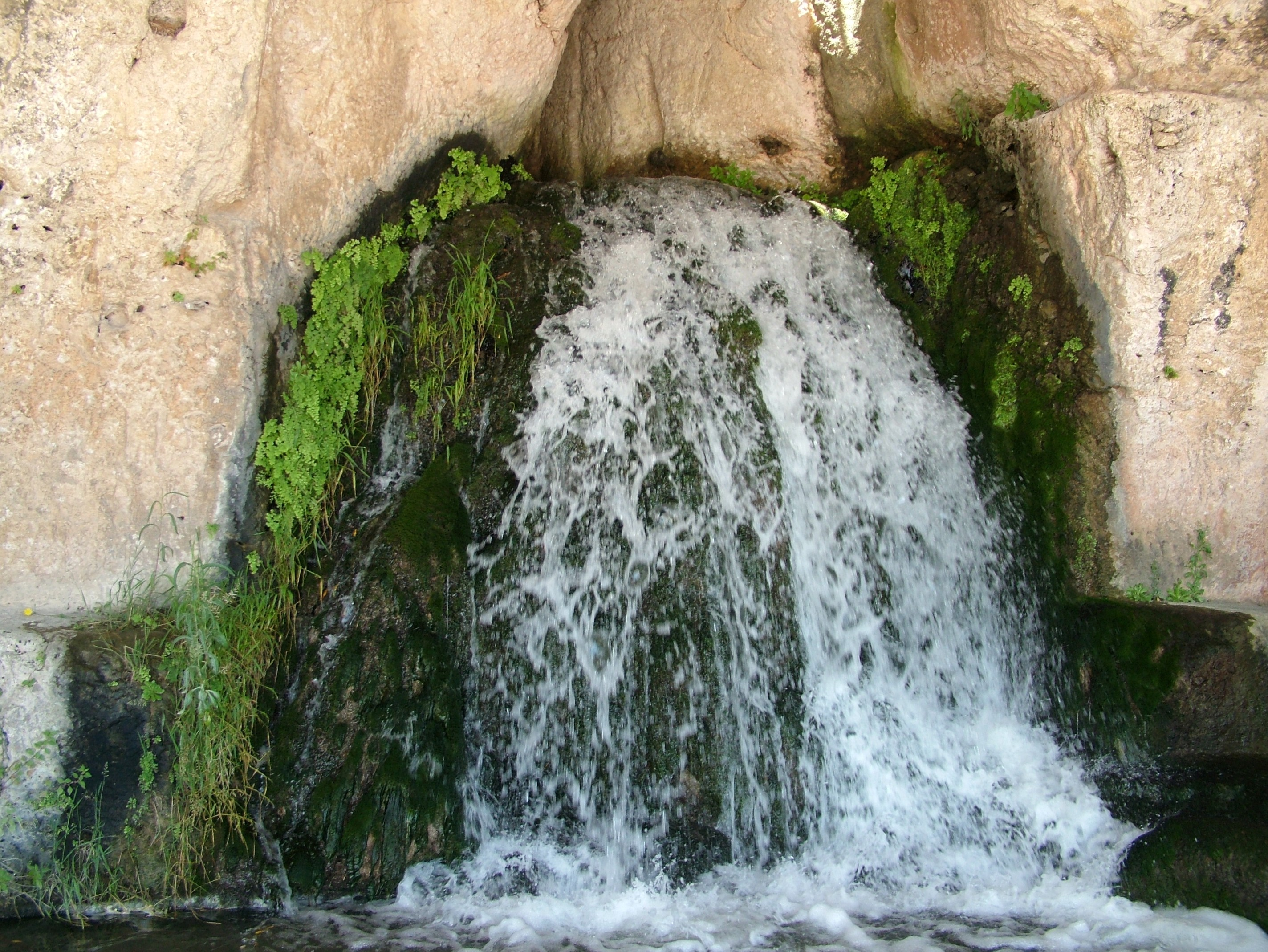 Siracusa, Italia, das Nymphaion im Parco Archeologico della Neapoli.